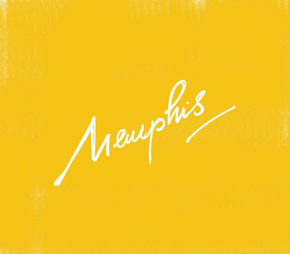 Logo Memphis